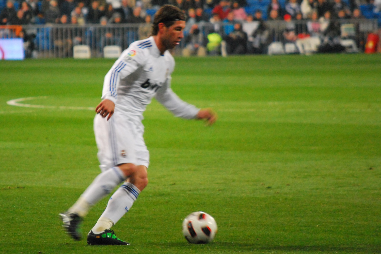 Sergio Ramos